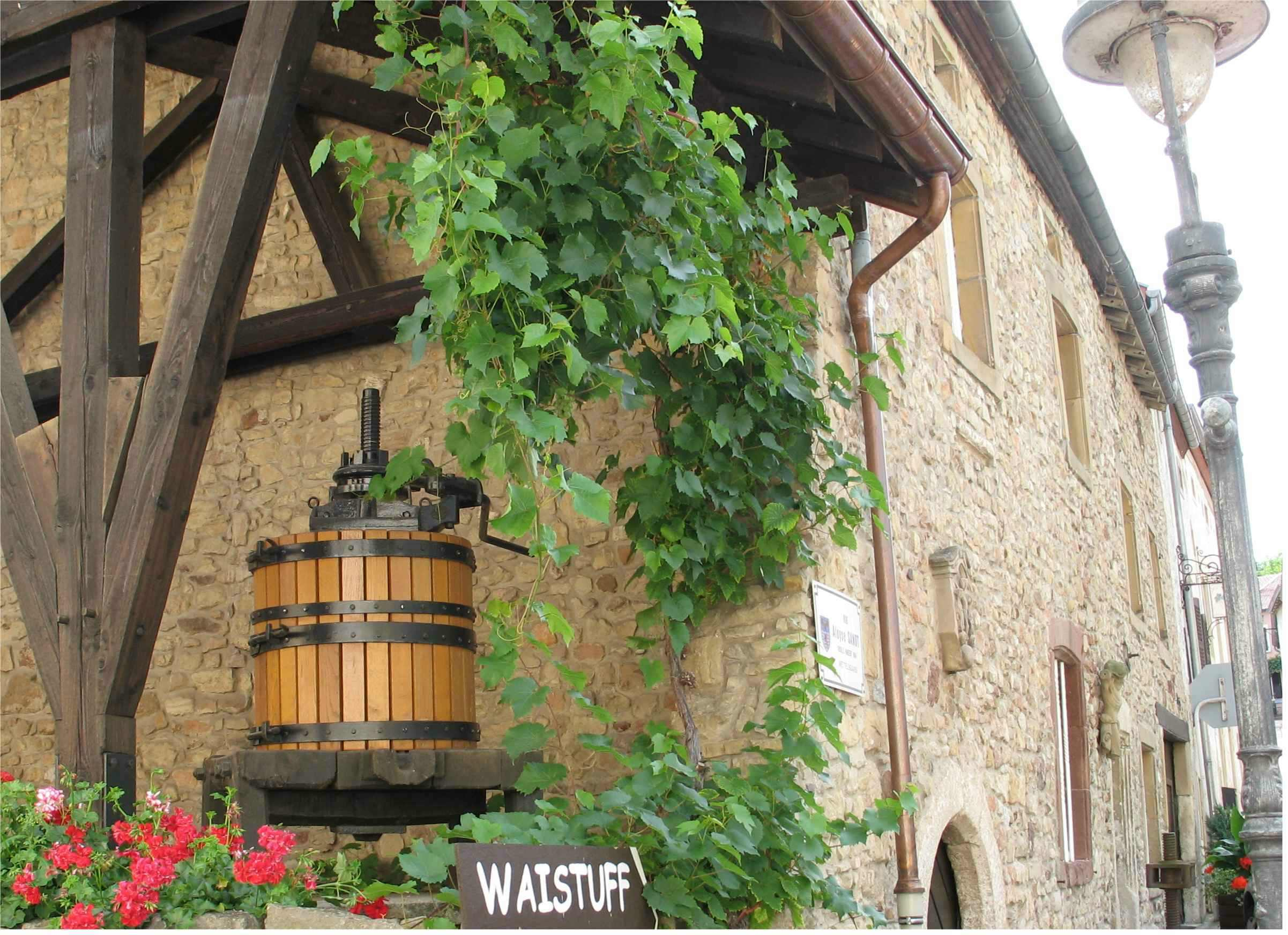 A Possen zu Bech-Maacher (Test)